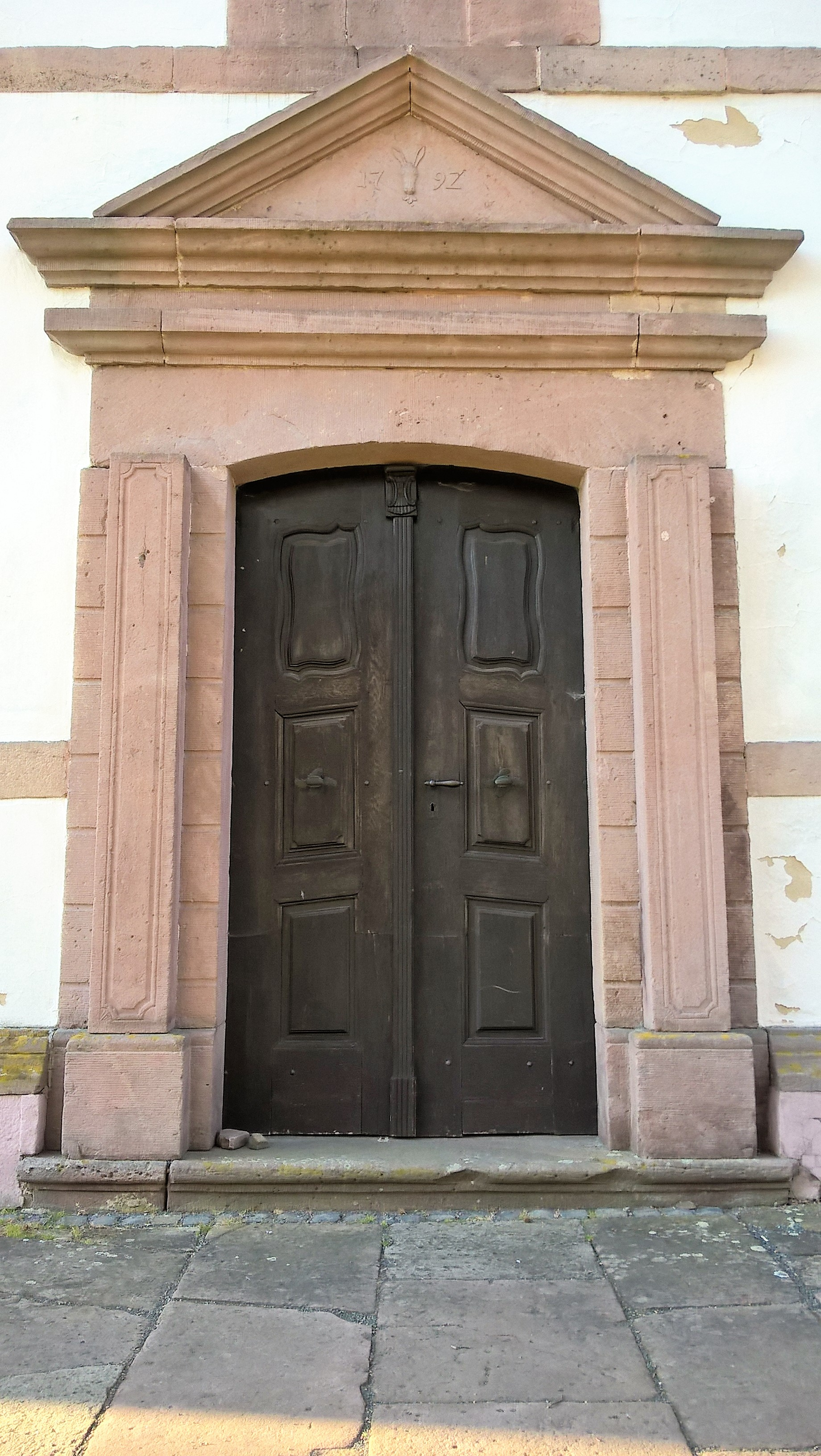 Evangelische Kirche Ober-Ohmen, Gemeinde Mücke, Vogelsbergkreis, Hessen, Deutschland